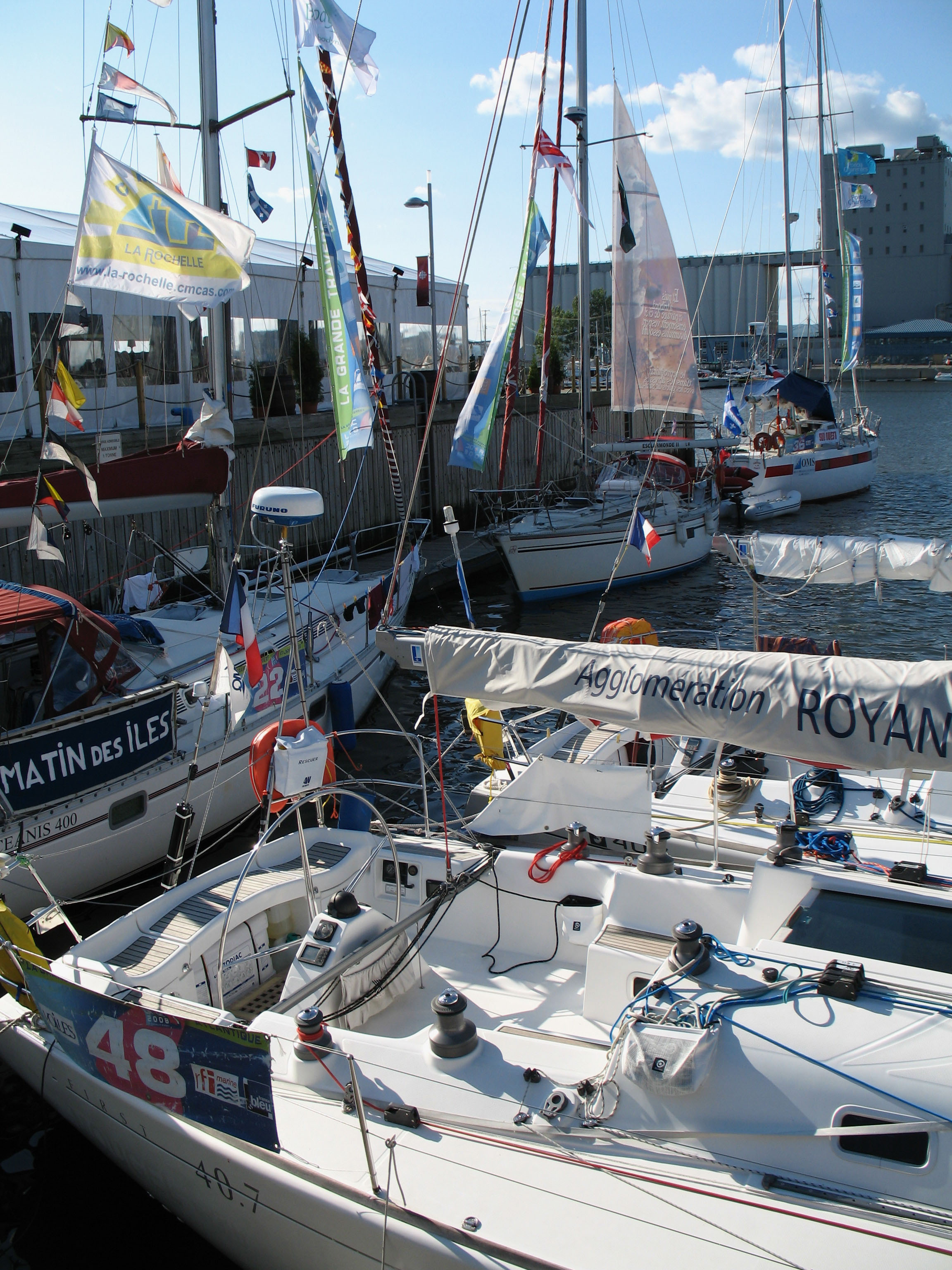 Bateaux de La Grande Traversée de l'Atlantique en provenance de La Rochelle amarrés au Vieux-Port de Québec (8 juillet 2008).